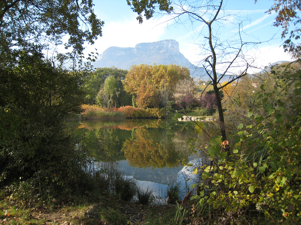 Le Granier qui se reflète dans le lac de Saint-André en Savoie à proximité de Chambéry Photo by MG.